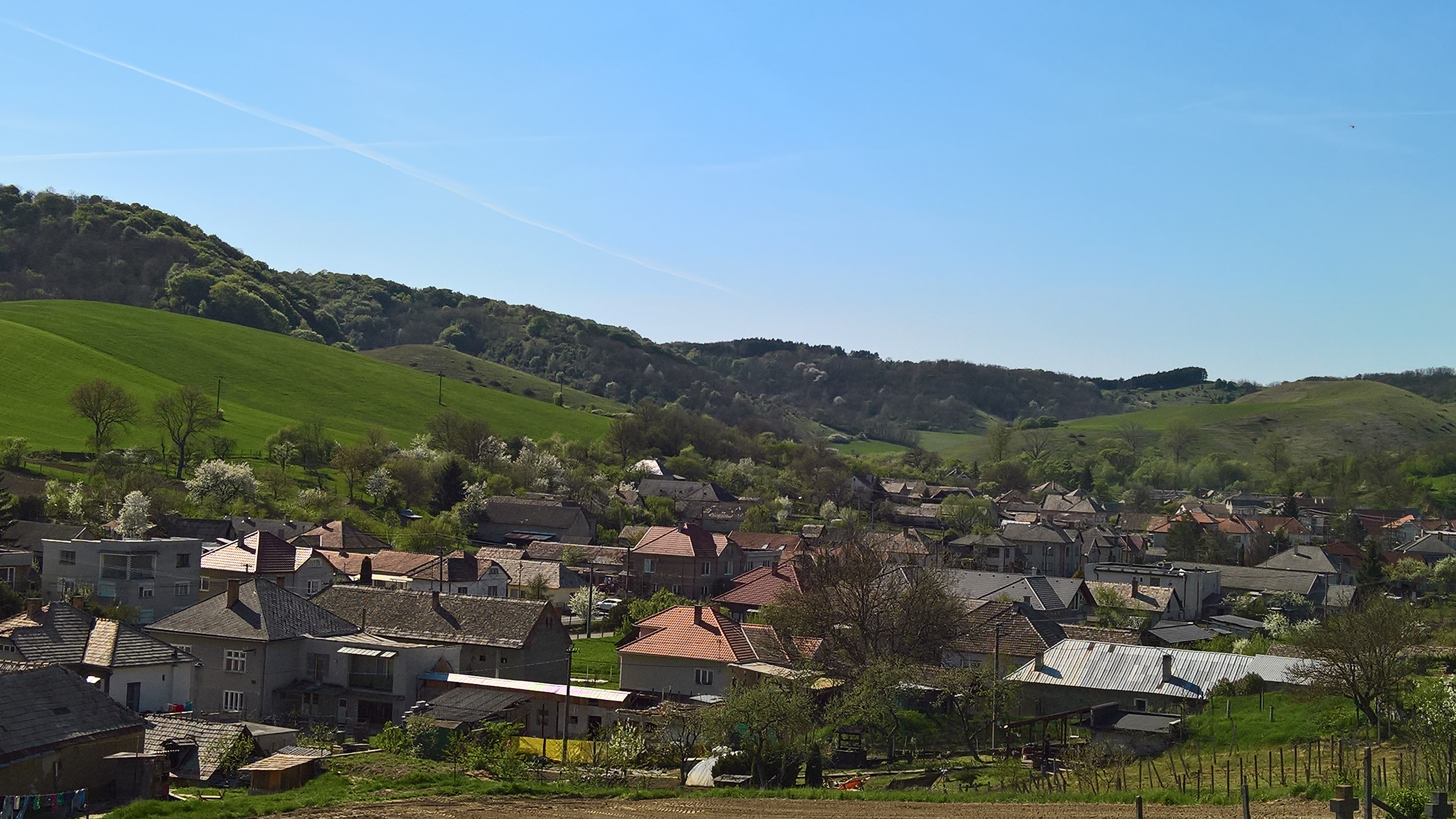 Détér község látképe